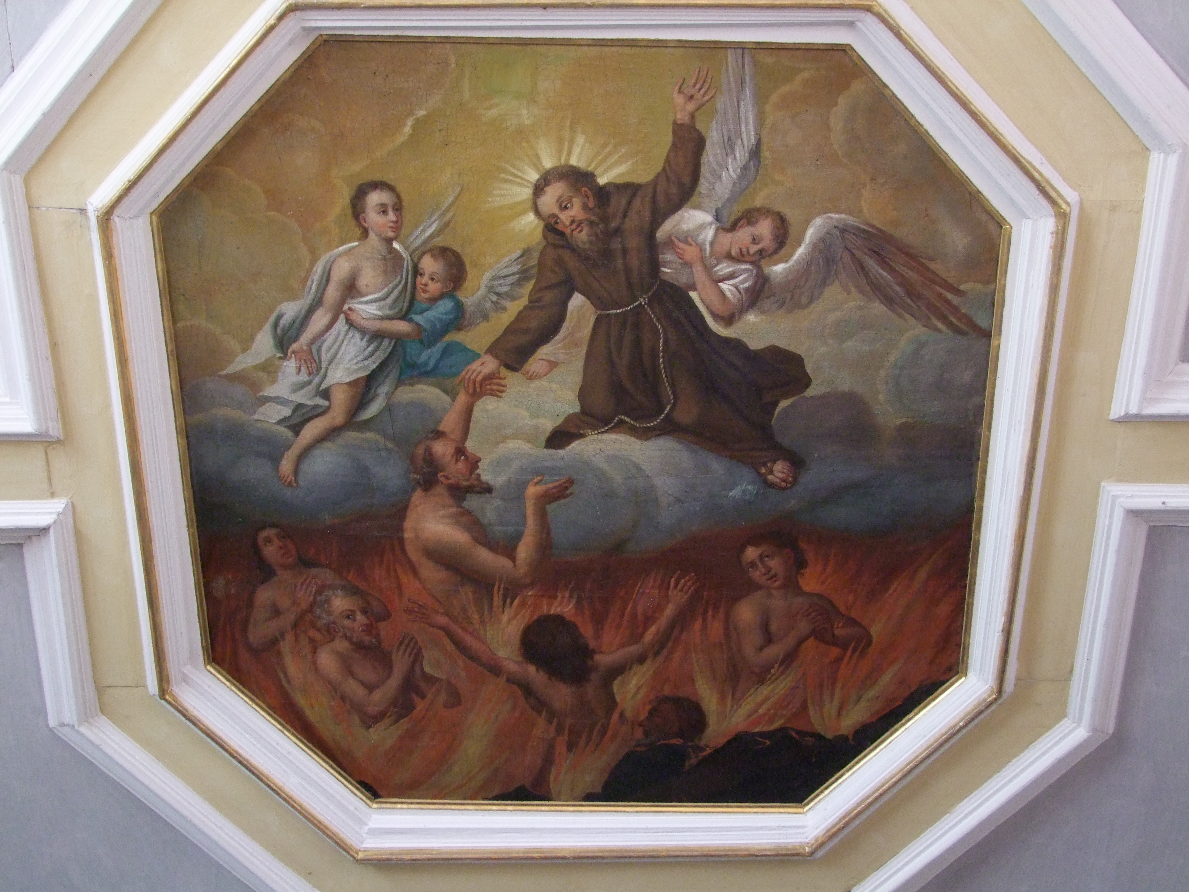 St. Franziskus und Georg im oberschwäbischen Altensteig, einem Ortsteil von Dirlewang in Bayerisch/Schwaben